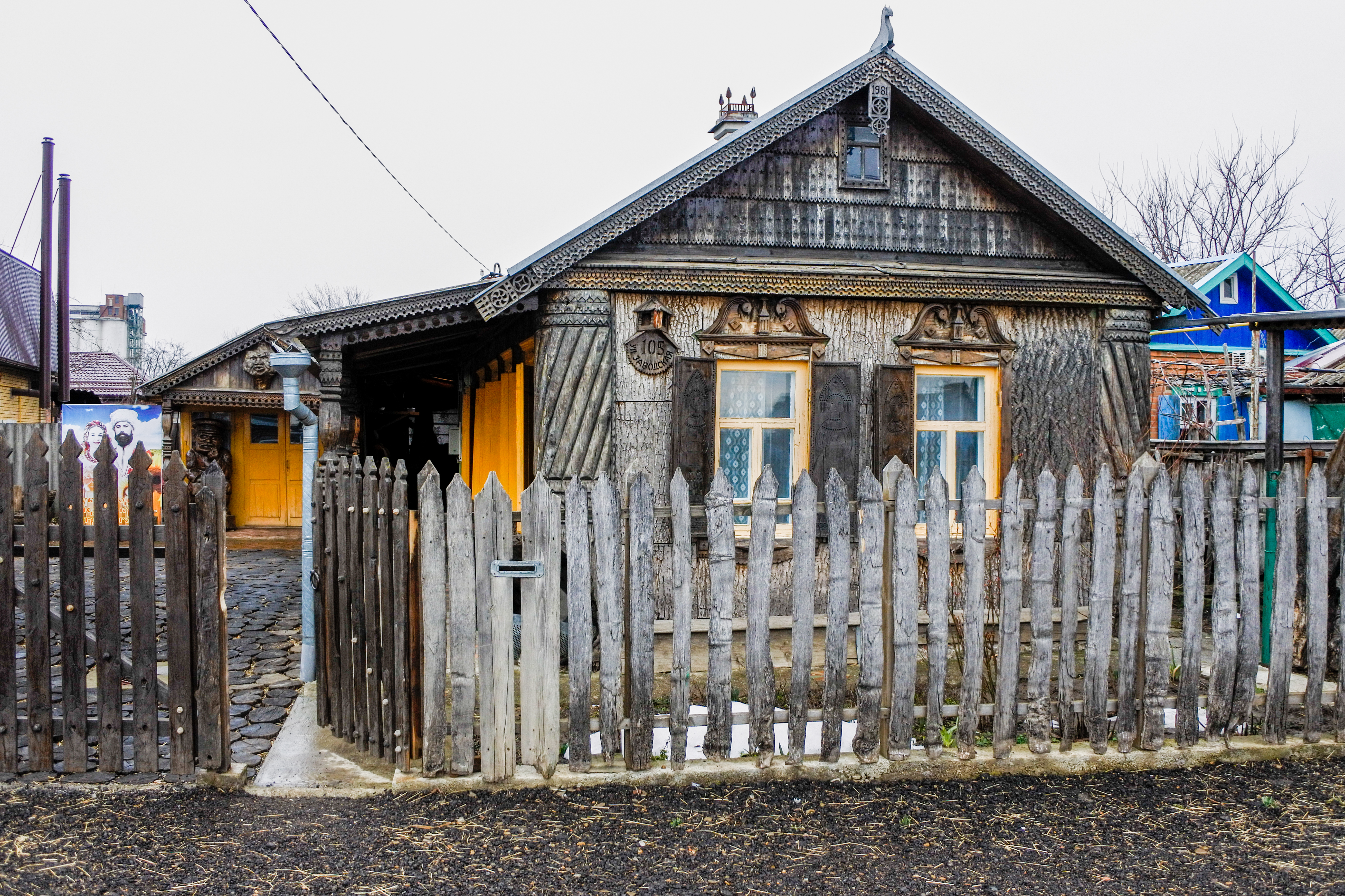 Подворье Ивана Андреевича Дончакова. Отдел народного декоративно-прикладного творчества Усть-Лабинского историко-краеведческого музея